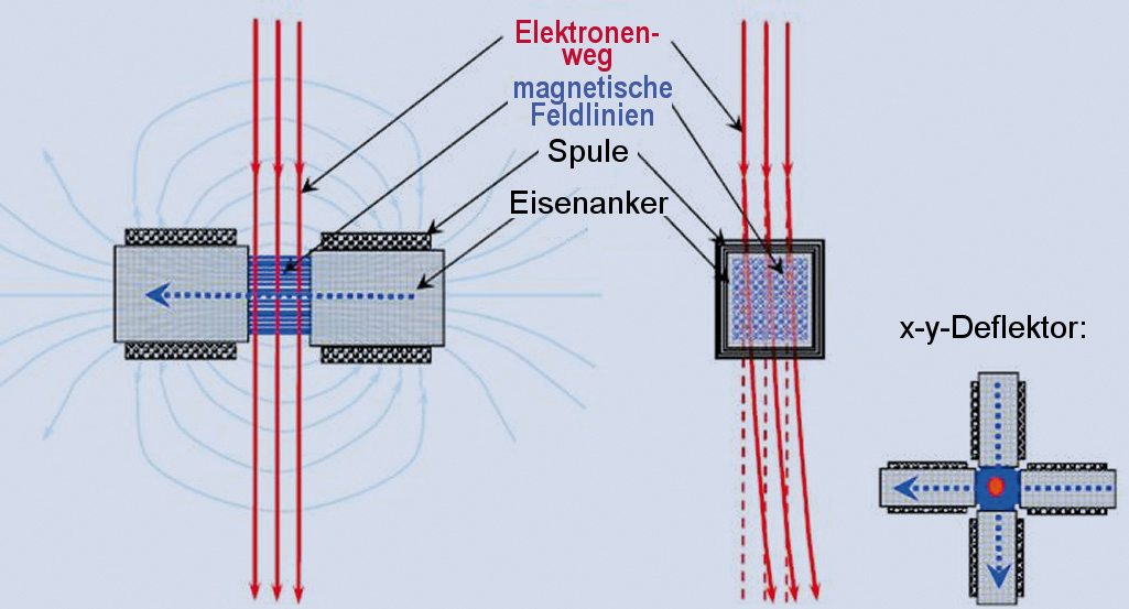 Elektronenstrahlablenkung